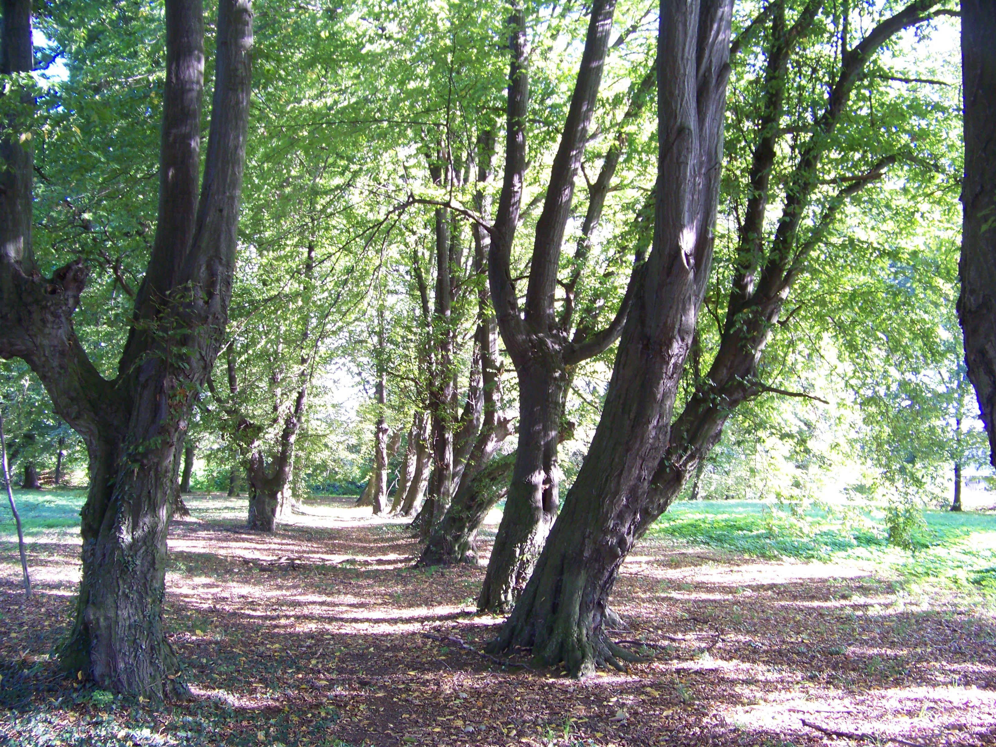 park dworski Oldrzyszowice, Lewin Brzeski 12.1986.